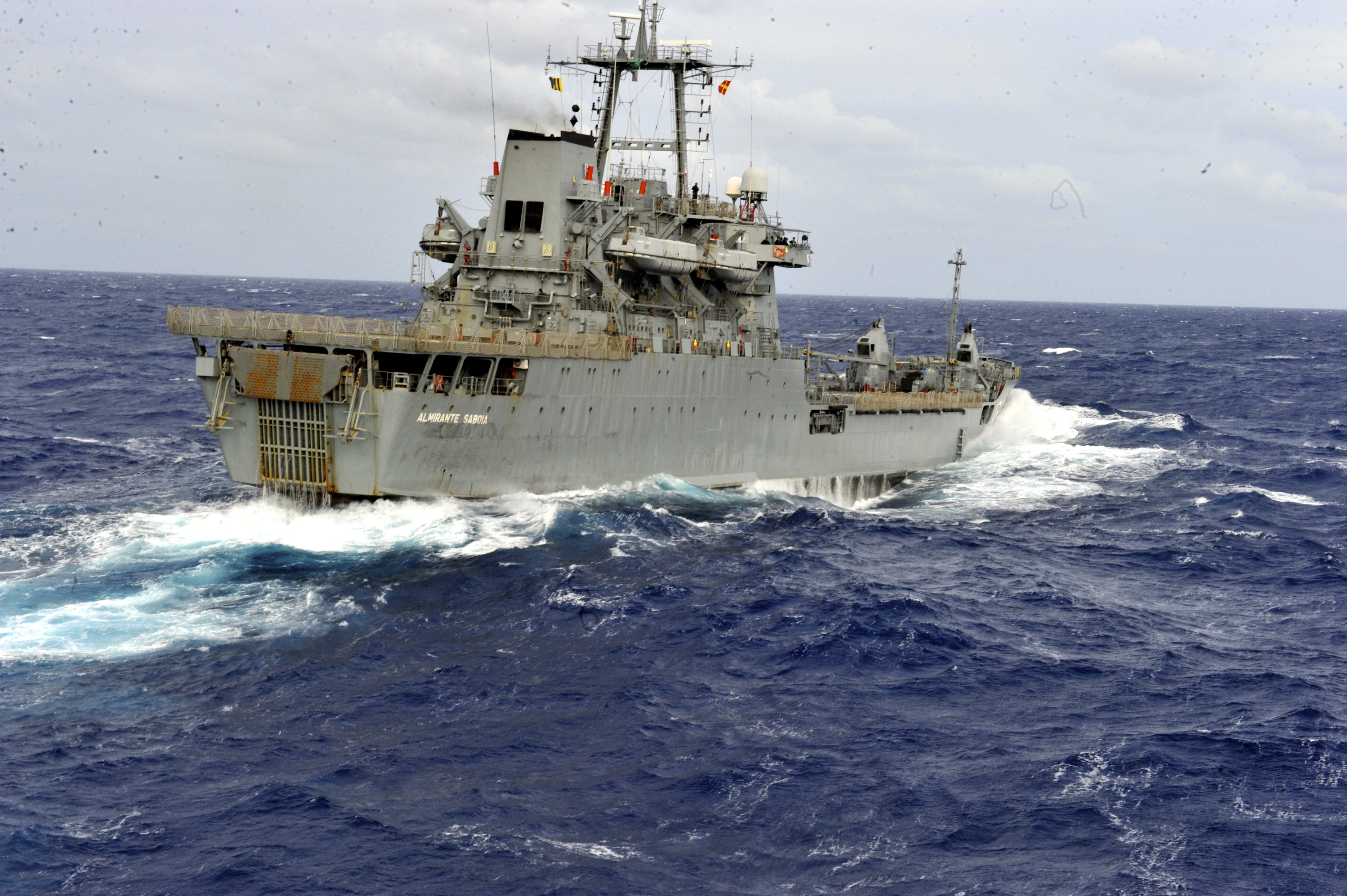 Arquivo liberado pela Marinha do Brasil através de projeto GLAM com Wiki Educação Brasil